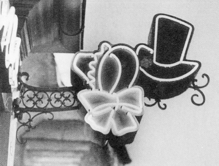 Neonskylt för Norrlins hattaffär i Västerås.